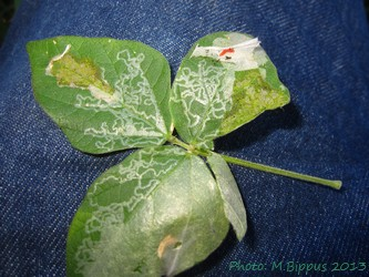 Phodoryctis caerulea mines & larvae on Canavalia sp. (Meyrick, 1912)